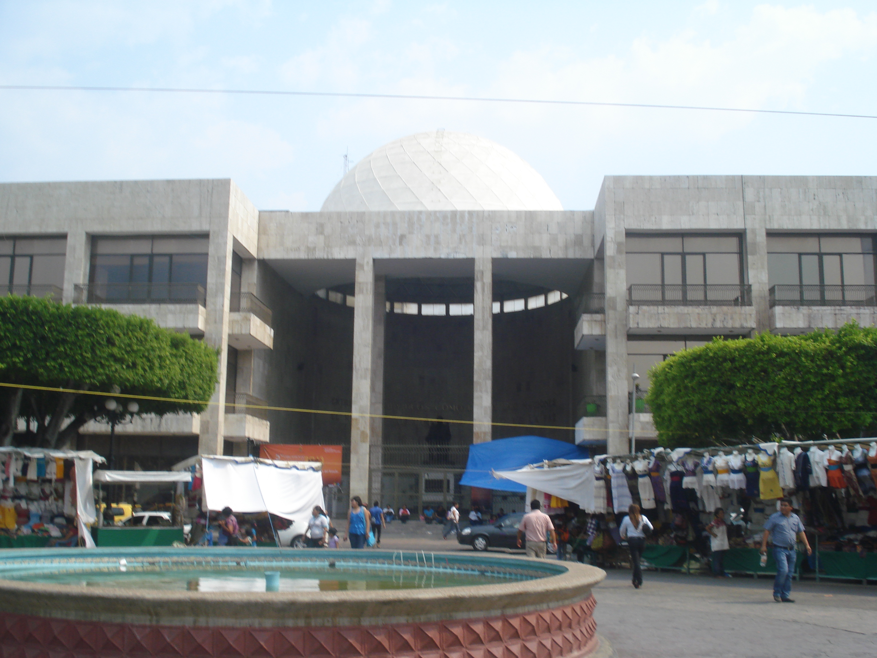 Palacio Legislativo de Chiapas en Tuxtla.